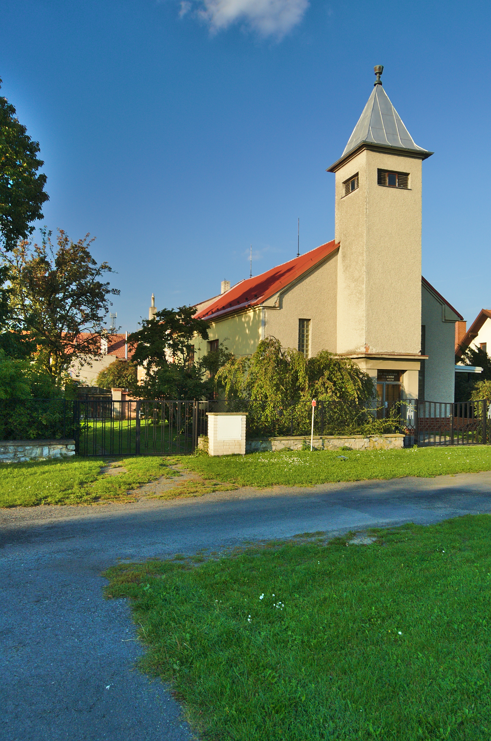 Husitský kostel svatého Cyrila a Metoděje, Pěnčín, okres Prostějov